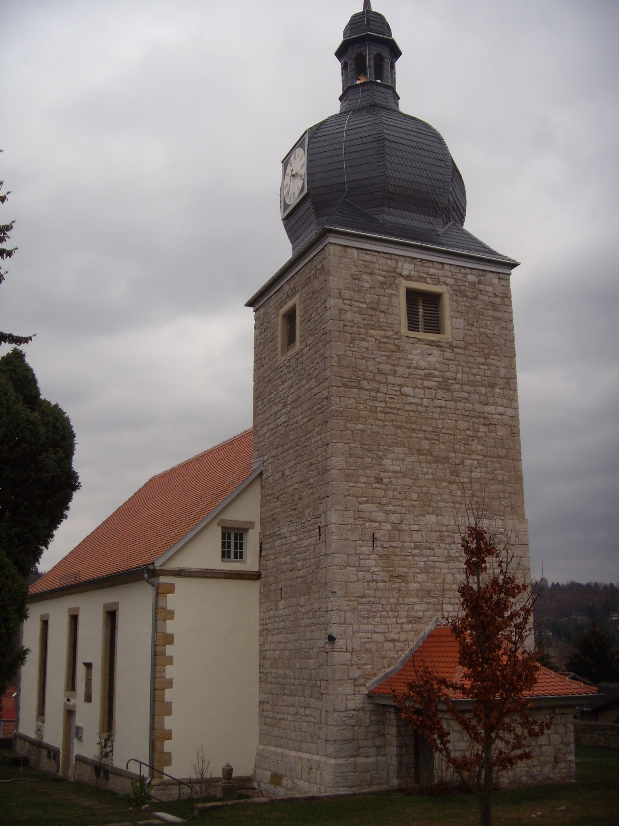 Church of Bischleben/Stedten.